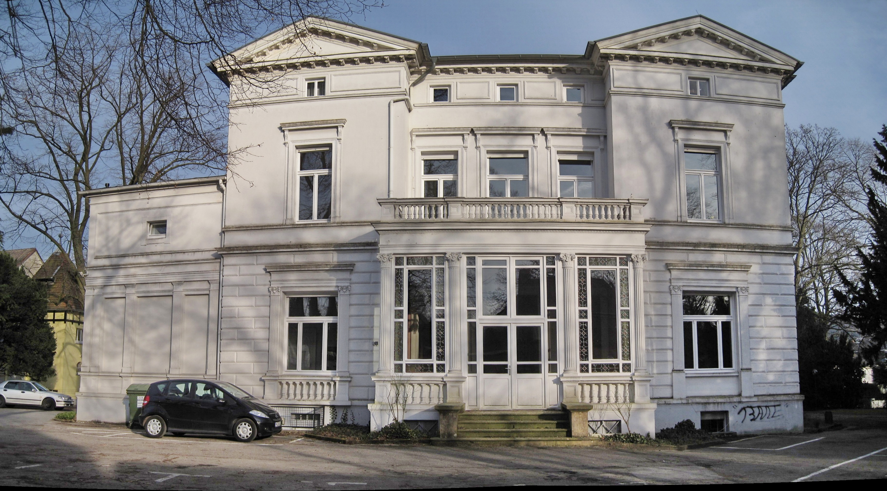 Villa Möllmann (heute Musikschule der Stadt Iserlohn) in Iserlohn, Gartenstraße 39. Denkmalschutz seit 2. Juni 1986.